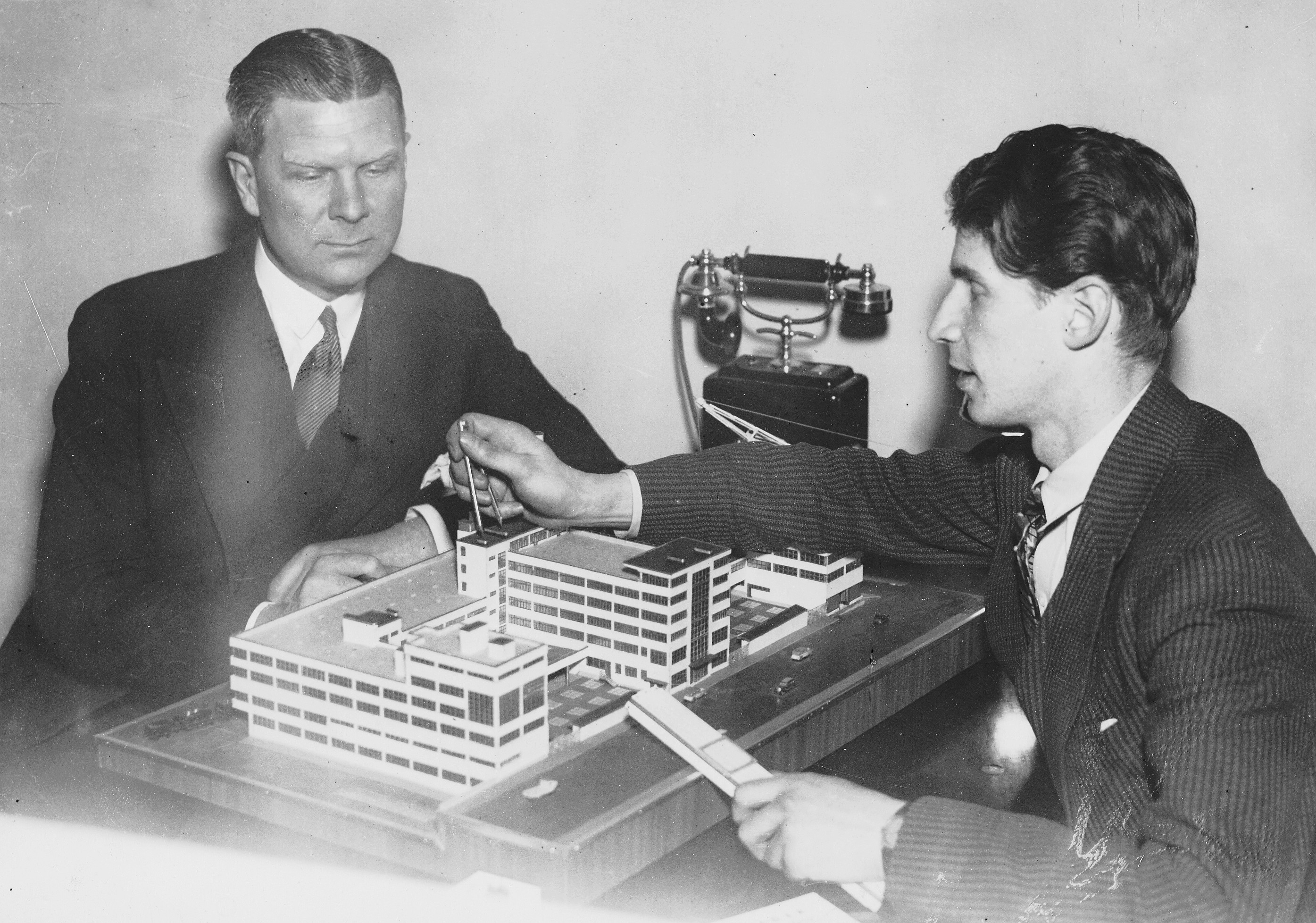 KF:s nya centrallager i kvarteret Fatburssjön, modellen med arkitekten Eric Rockström (t.v.)